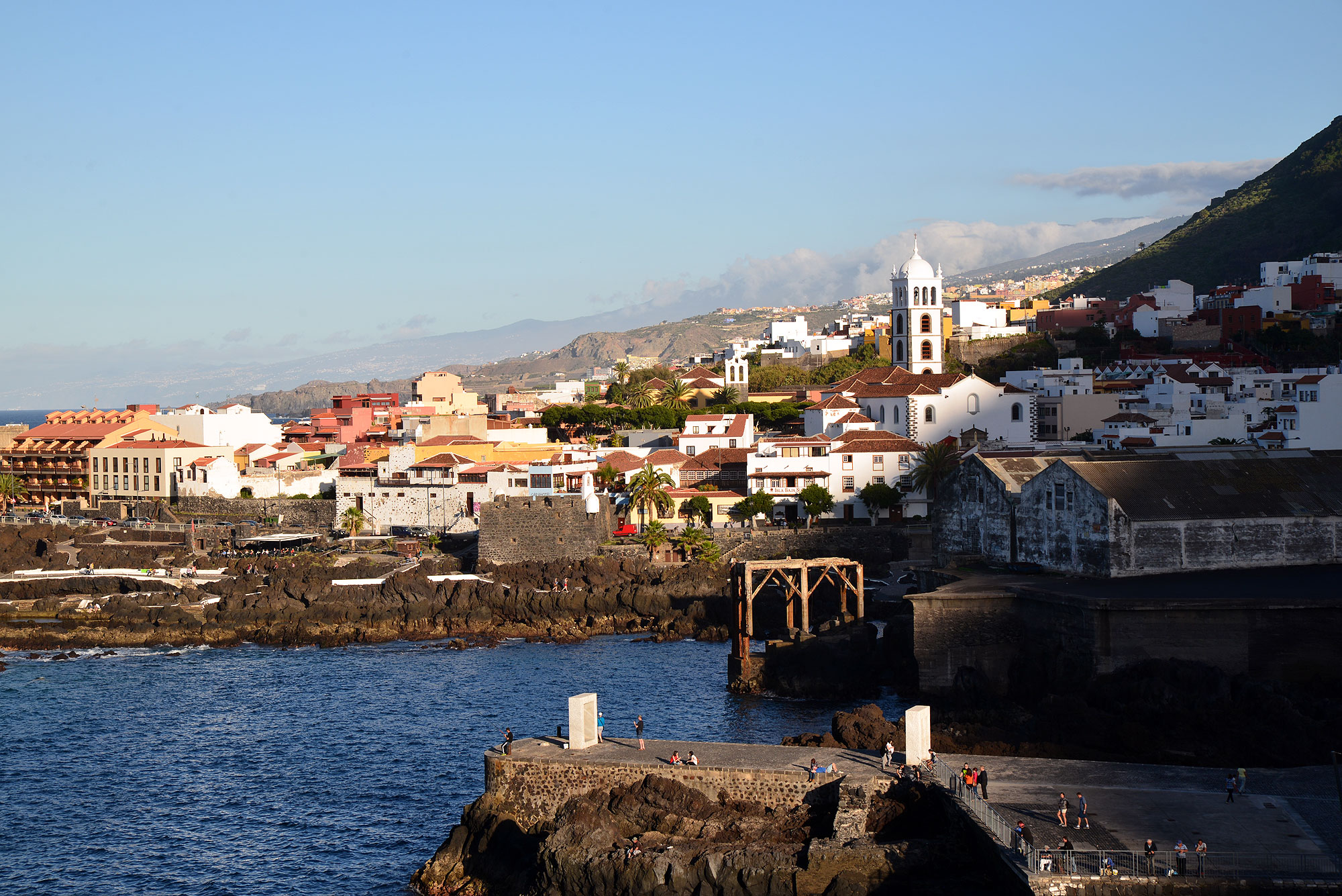 Blick auf Garachico vom Mirador del Emigrante